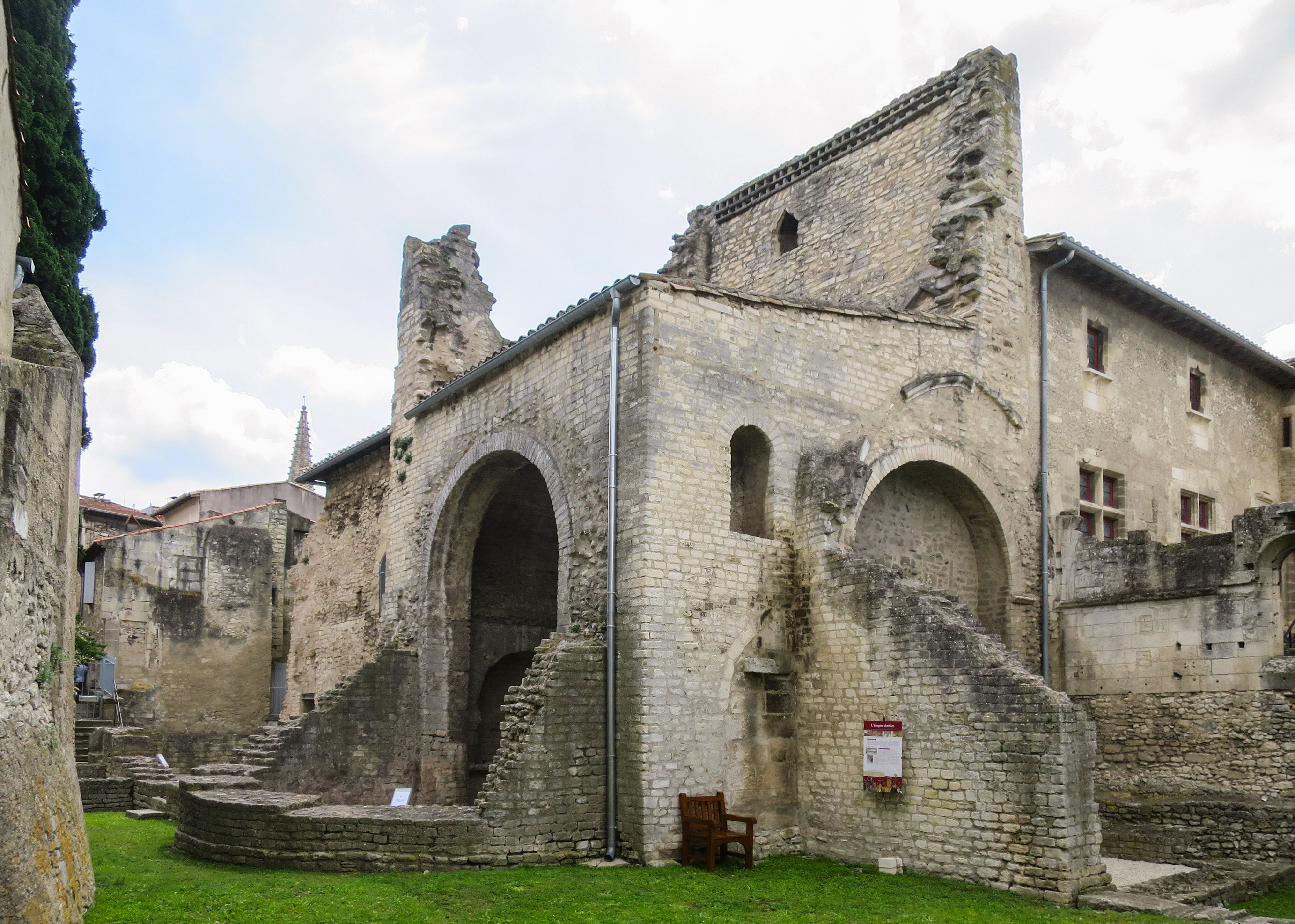 Hôtel de Sade in Saint-Rémy-de-Provence, römische Therme auf der Rückseite des Gebäudes